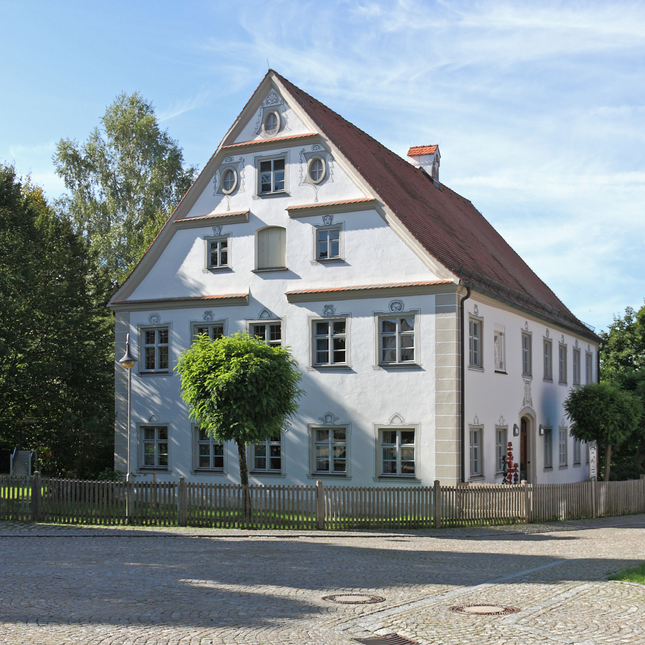 Ehemaliger Pfarrhof, Langenhaslach; Nordwestansicht des jetzt als Kindergarten genutzten Gebäudes